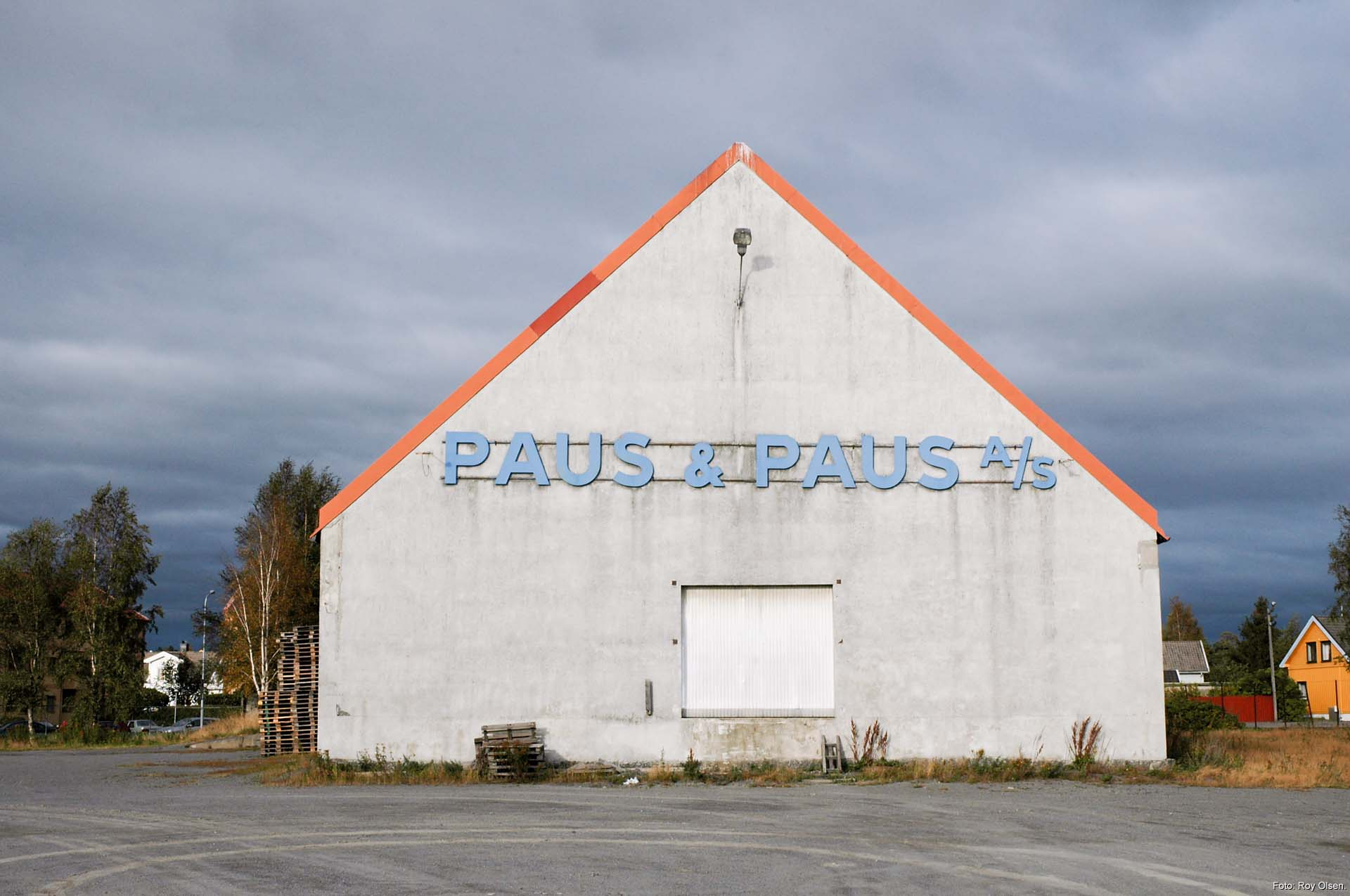 Industribygg for Paus & Paus i Strandgata 40 i Larvik